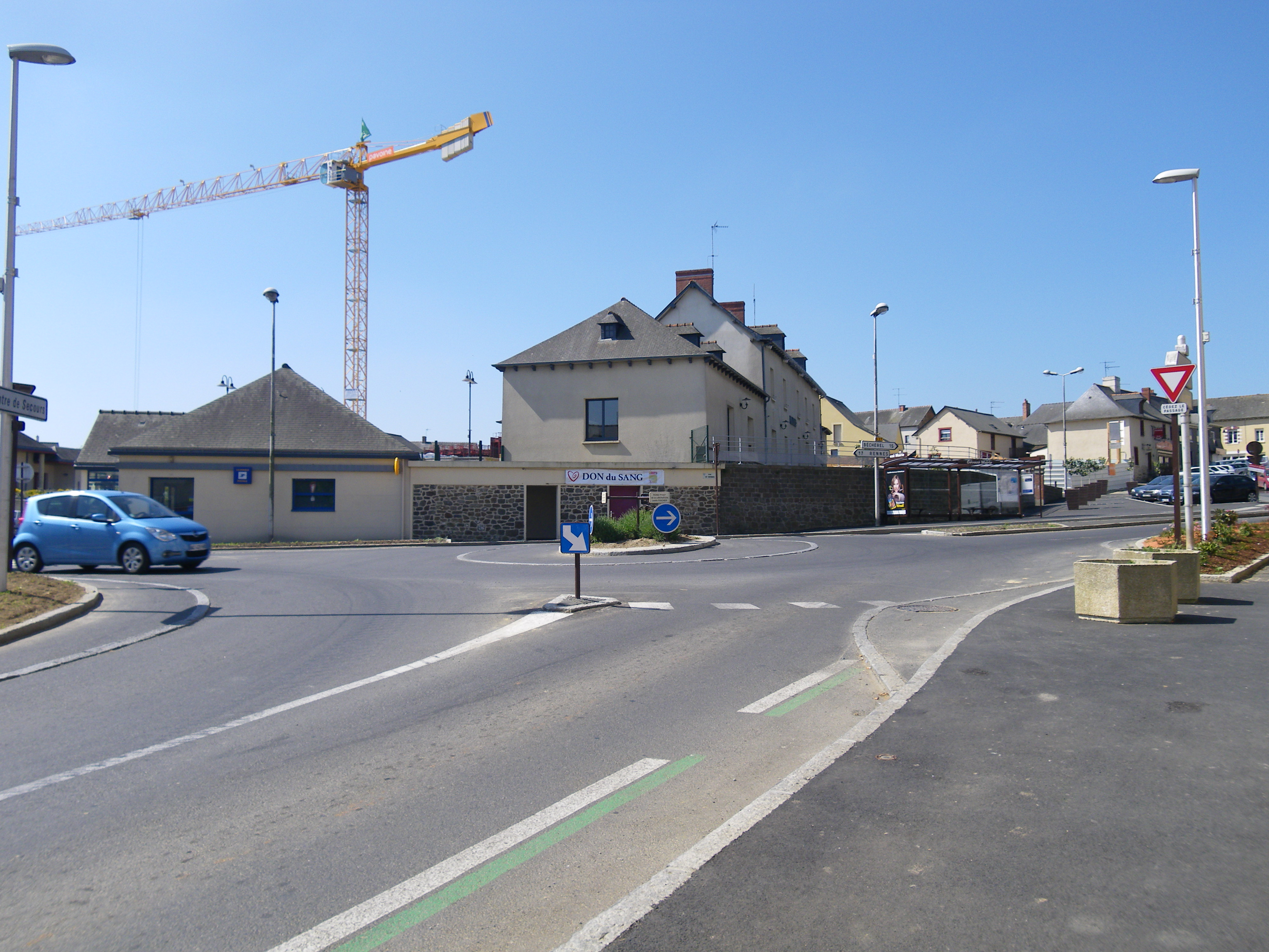 vue de gevezé